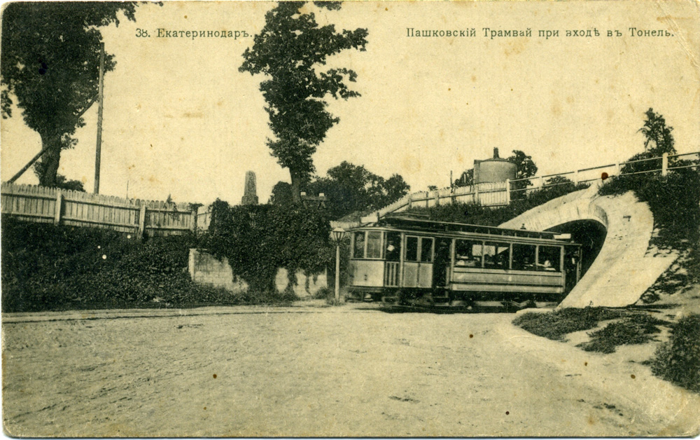 Пашковский трамвай при входе в тоннель. Екатеринодар.